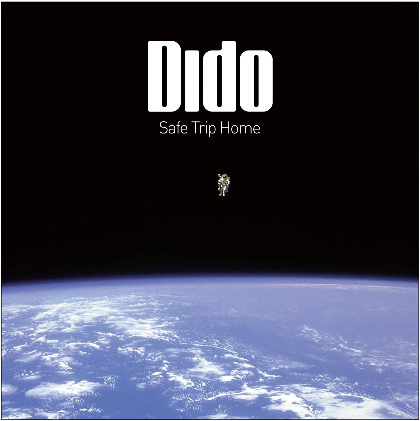 Albumcover von Safe Trip Home